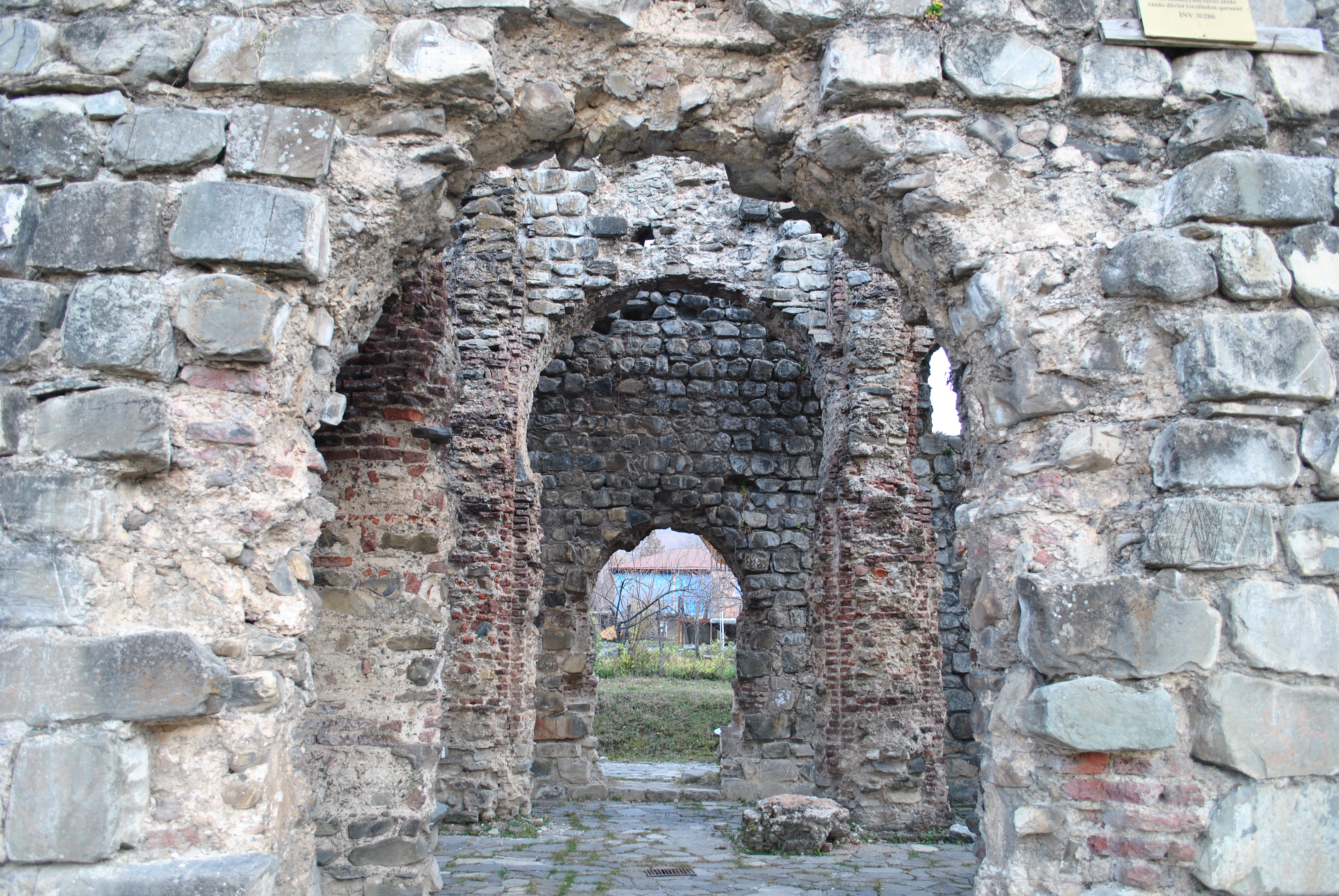 Məbədin cənub-qərb istiqamətindəki girişindən görünüş